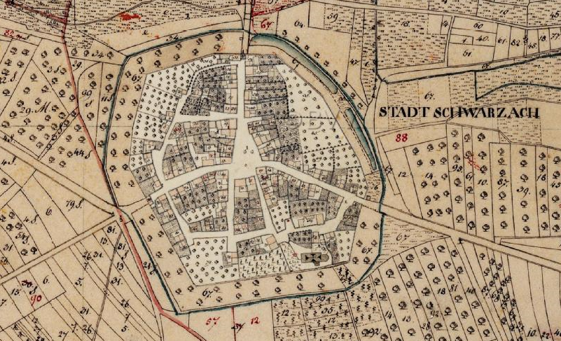 Kartenausschnitt Urkataster Bayern, Altstadt Stadtschwarzach